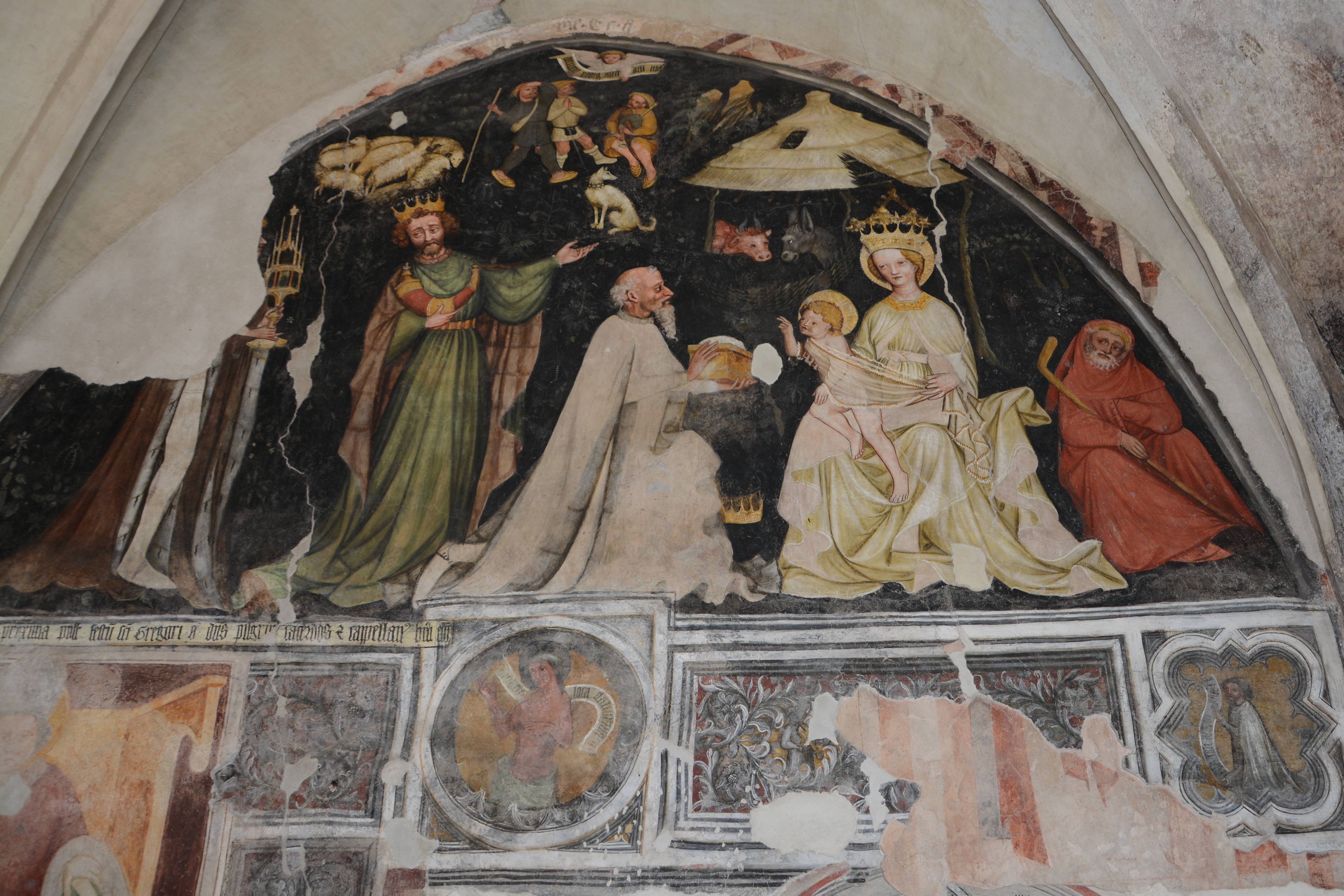 Fresko im Kreuzgang des Brixner Domes, Ostwand der 13. Arkade: Anbetung der Könige. Unbekannter Meister, 1410.